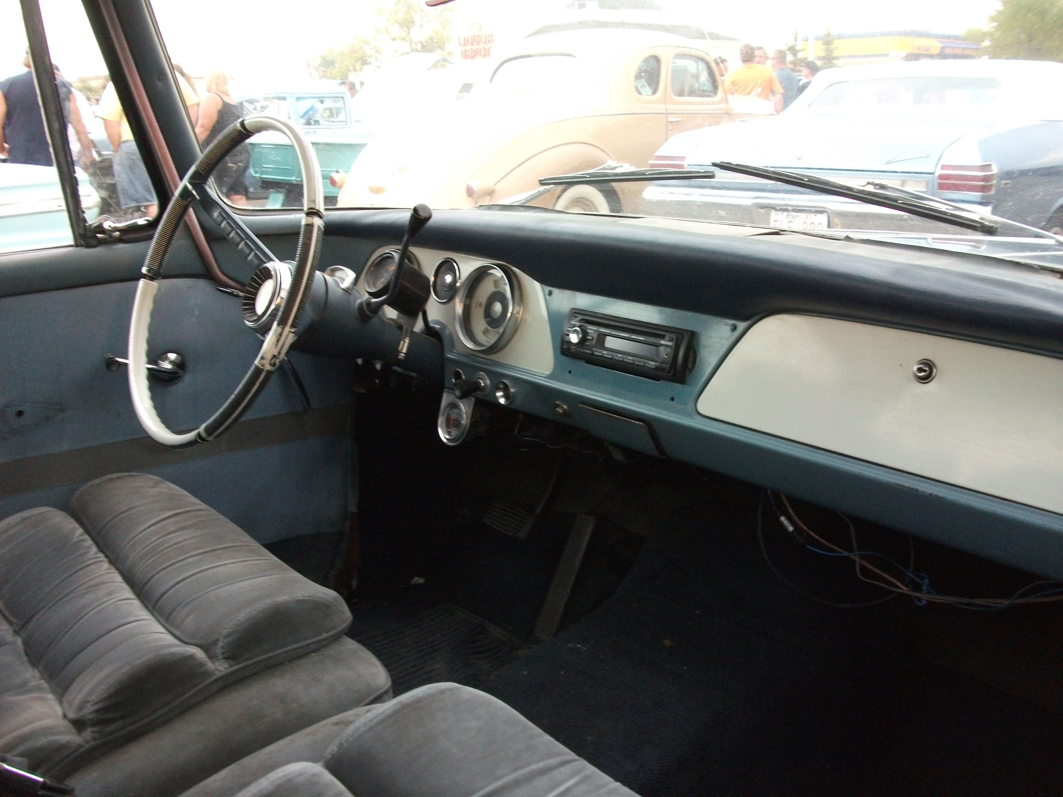 Studebaker Lark VI interior